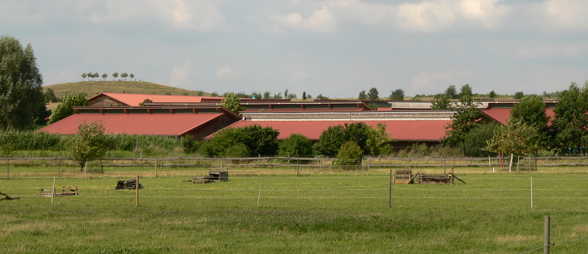 Ehemalgs Herrmannsdorfer Landwerkstätten am Kronsberg